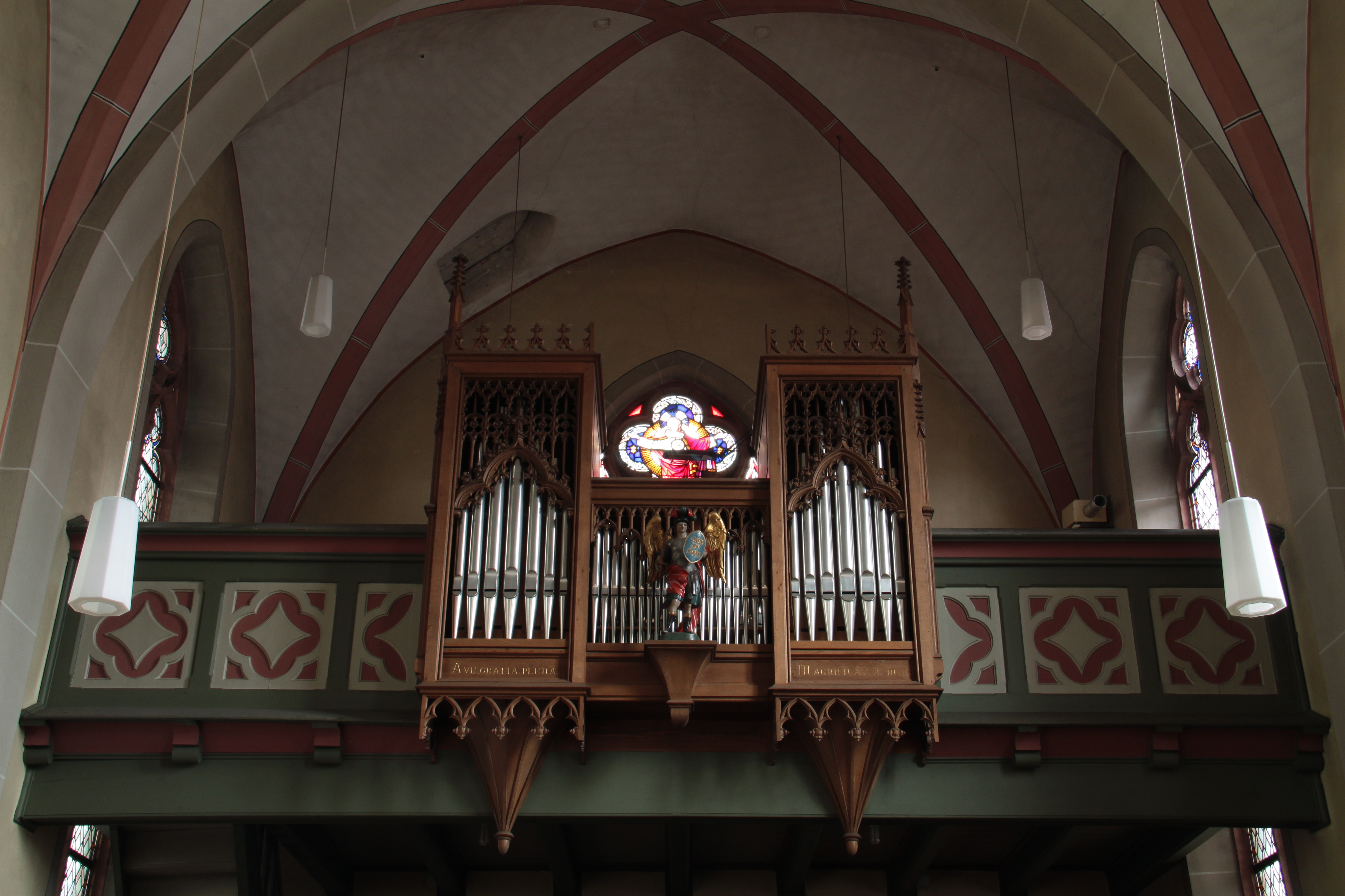 Katholische Kapelle St. Michael, Meckenheim (Merl) This is a photograph of an architectural monument.